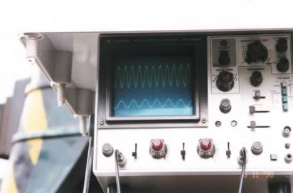 Utilización de un osciloscopio para medir señal en sistema de detección de trenes en paso a nivel. Foto tomada por Tano4595 11:44, 24 Feb 2005 (UTC) en 1998 durante las pruebas correspondientes al sistema de detección. A la izquierda se observa el frente de la locomotora.